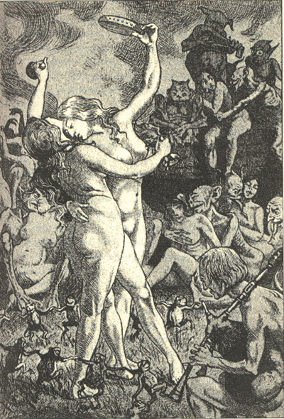 Dessins de Martin van Maële. Illustration de La sorcière, de Jules Michelet. 1911.